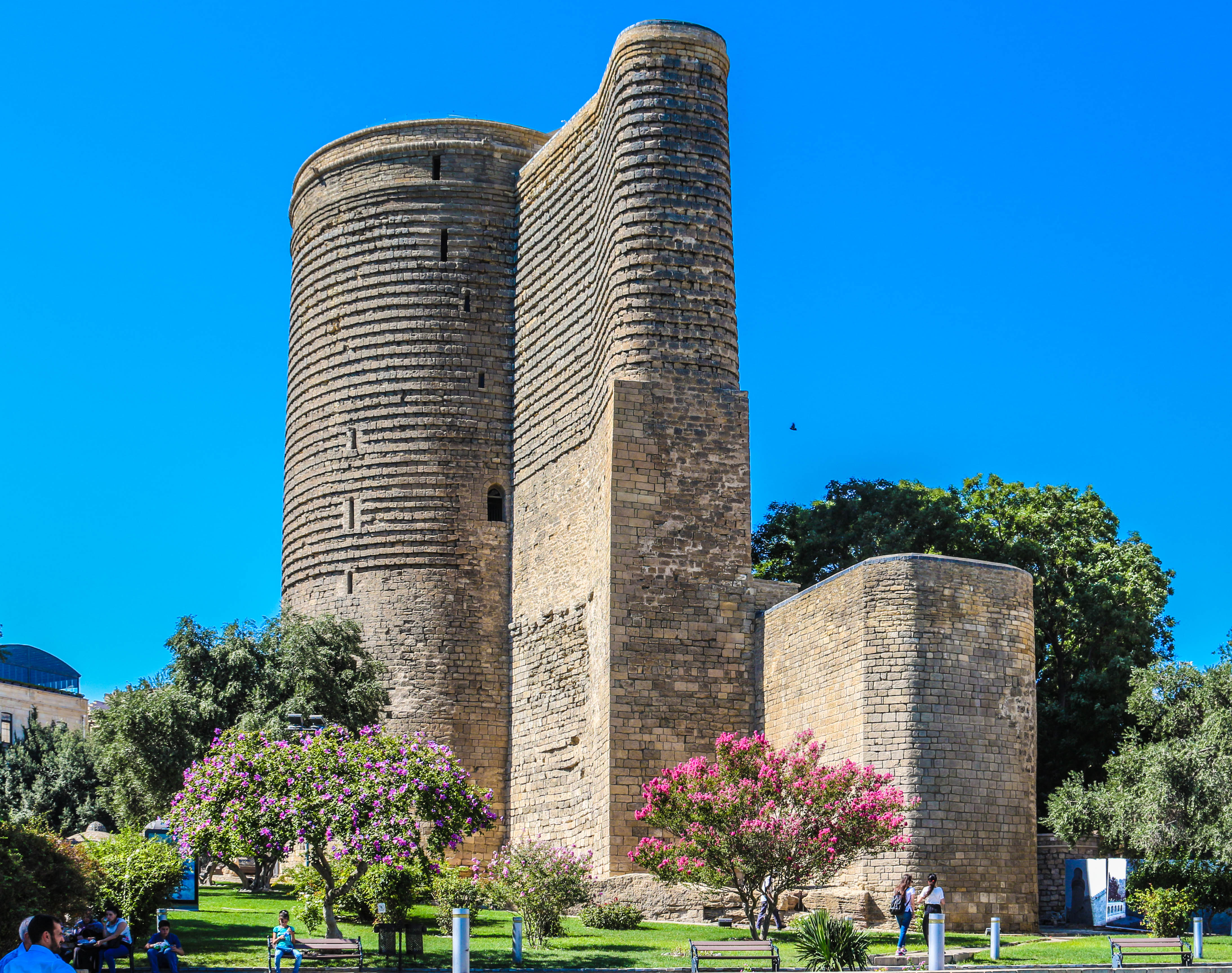 Qız qalası